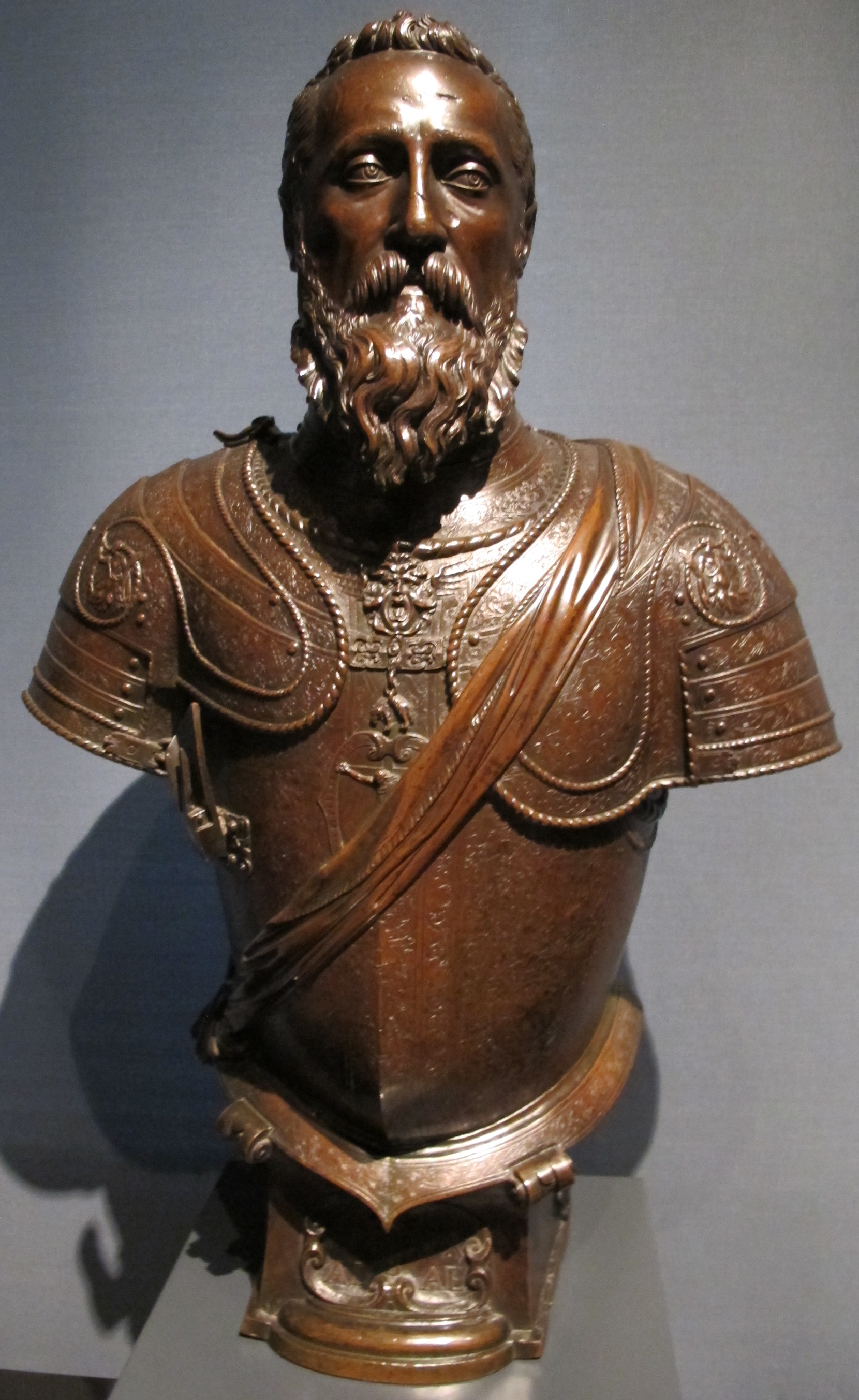 Leone leoni, don ferdinando alvarez de toledo, 3° duca d'alba, 1554-1556